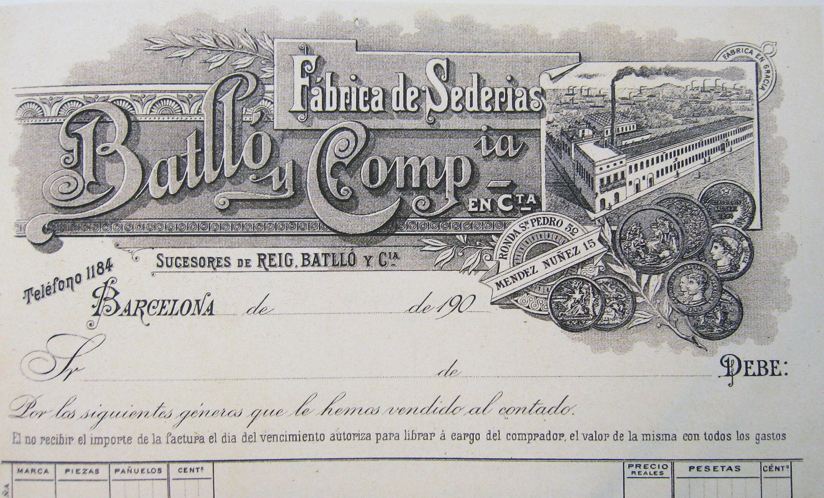 Factura de la fàbrica "Batlló i Cia" de 1890